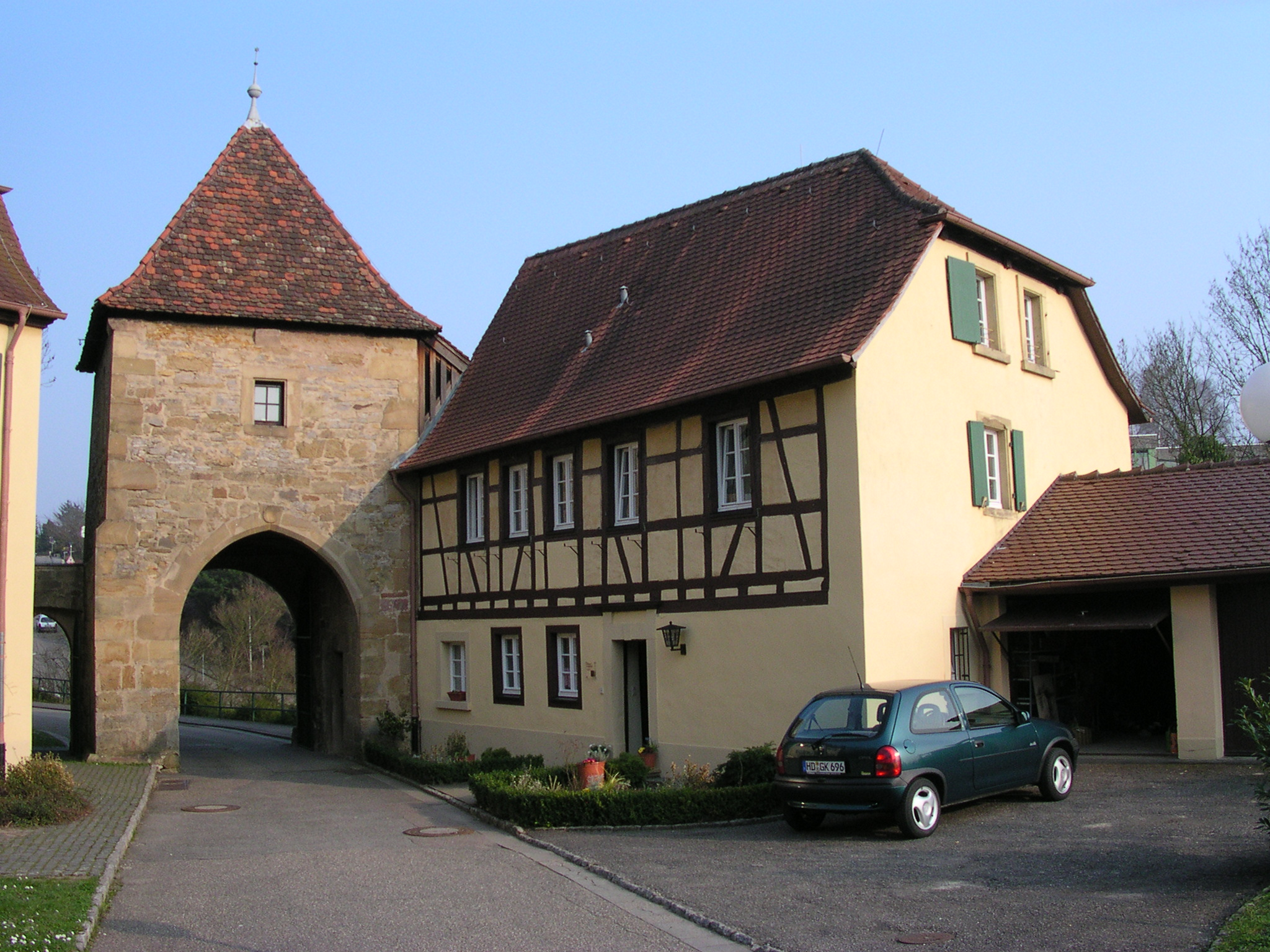 Sinsheim. Torgebäude von Stift Sunnisheim